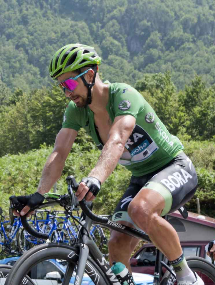 PY104162 burghardt sagan